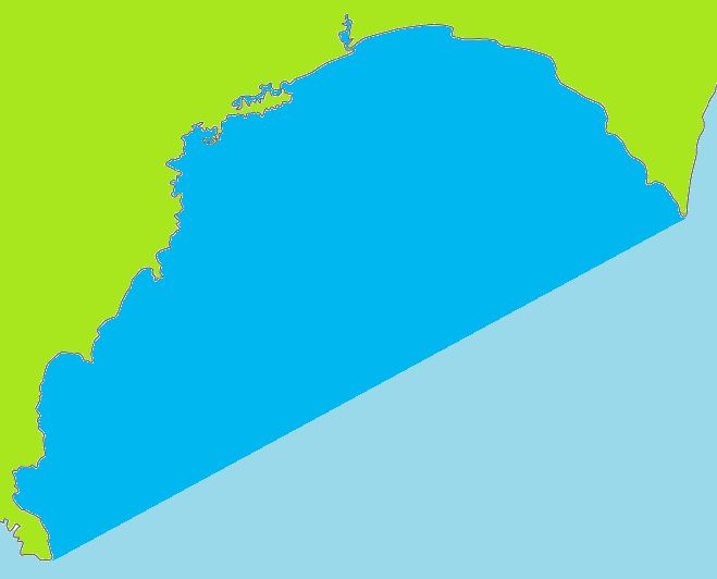 土佐湾の範囲を示した地図。 海岸線そのものは白地図専門店より。